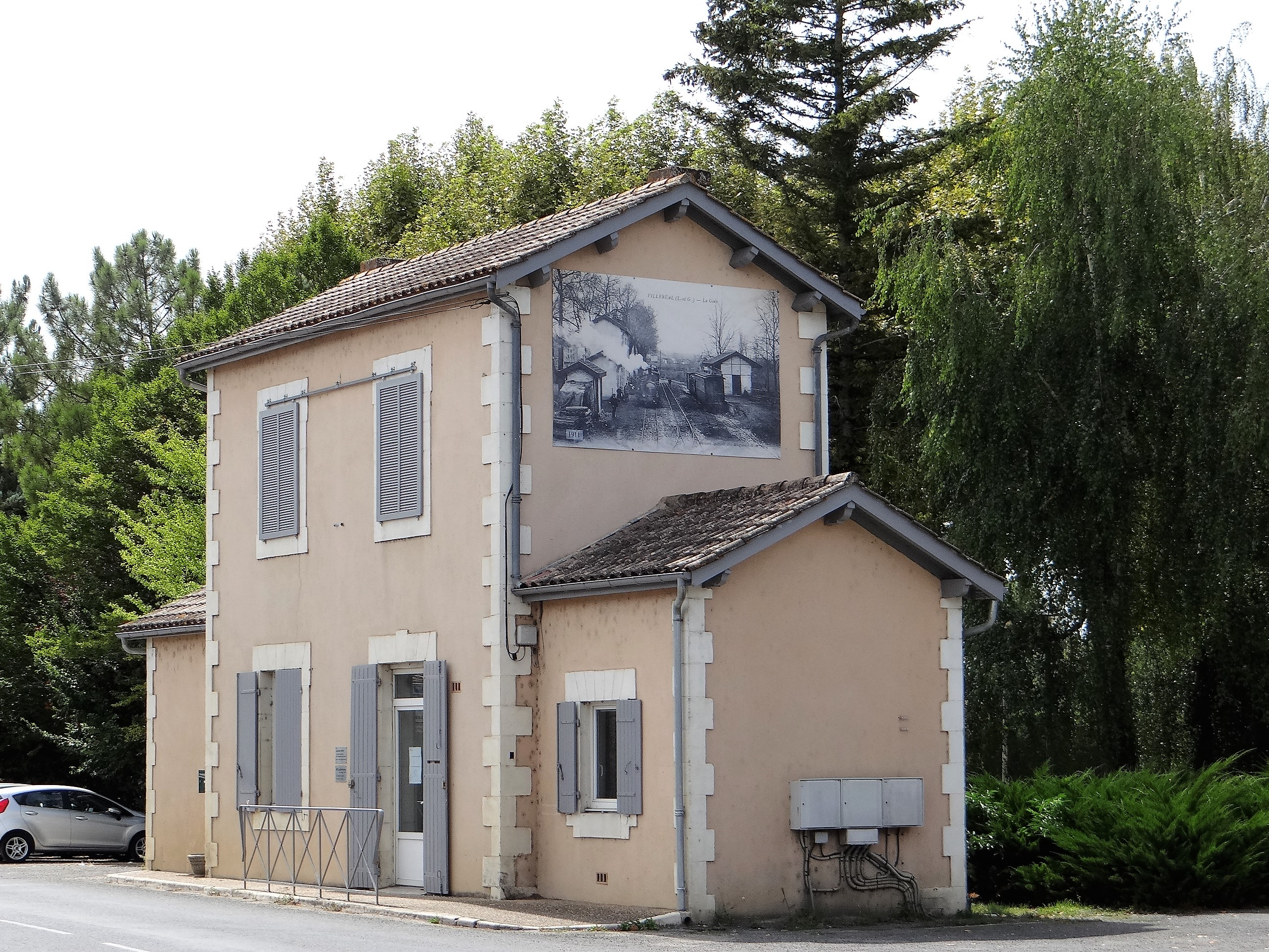 Villeréal - Ancienne gare du tramway